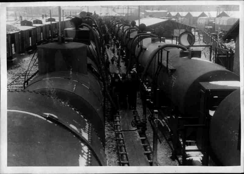 Deutscher und russischer Öltransportzug (links) auf dem Verladebahnhof Przemyśl, Schlauchleitungen sind von Tankwagen zu Tankwagen gelegt, das Umfüllen ist wegen der unterschiedlichen Spurweiten der Geleise erforderlich.